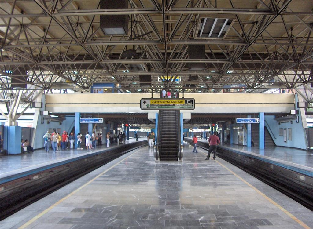 Metro Chabacano Linea 2 Vista desde el transbordo de linea 2 Creada por:Cabrakan